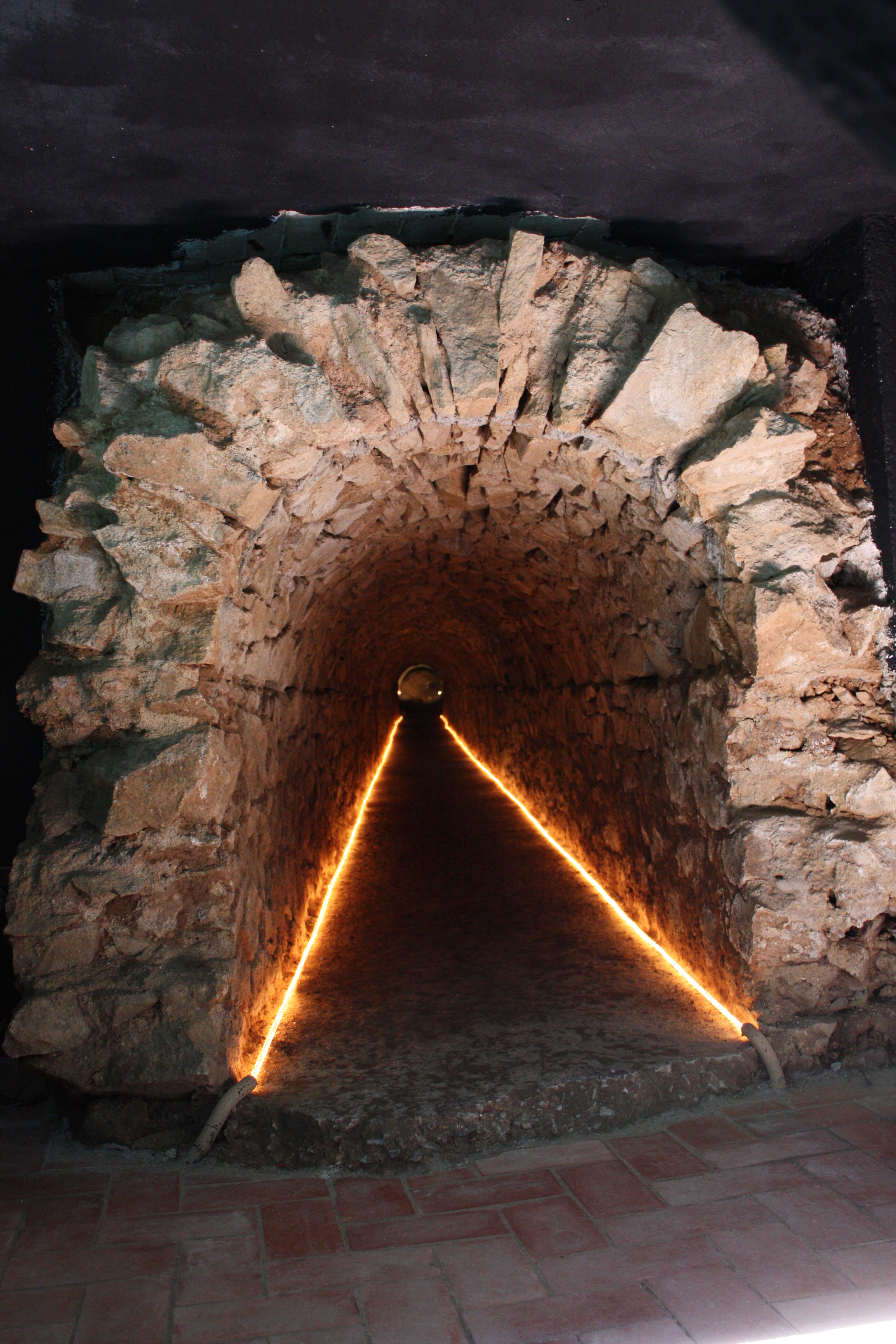 Conducte d'aigües de la ciutat romana de Baetulo (Badalona), situat al carrer d'en Pujol.